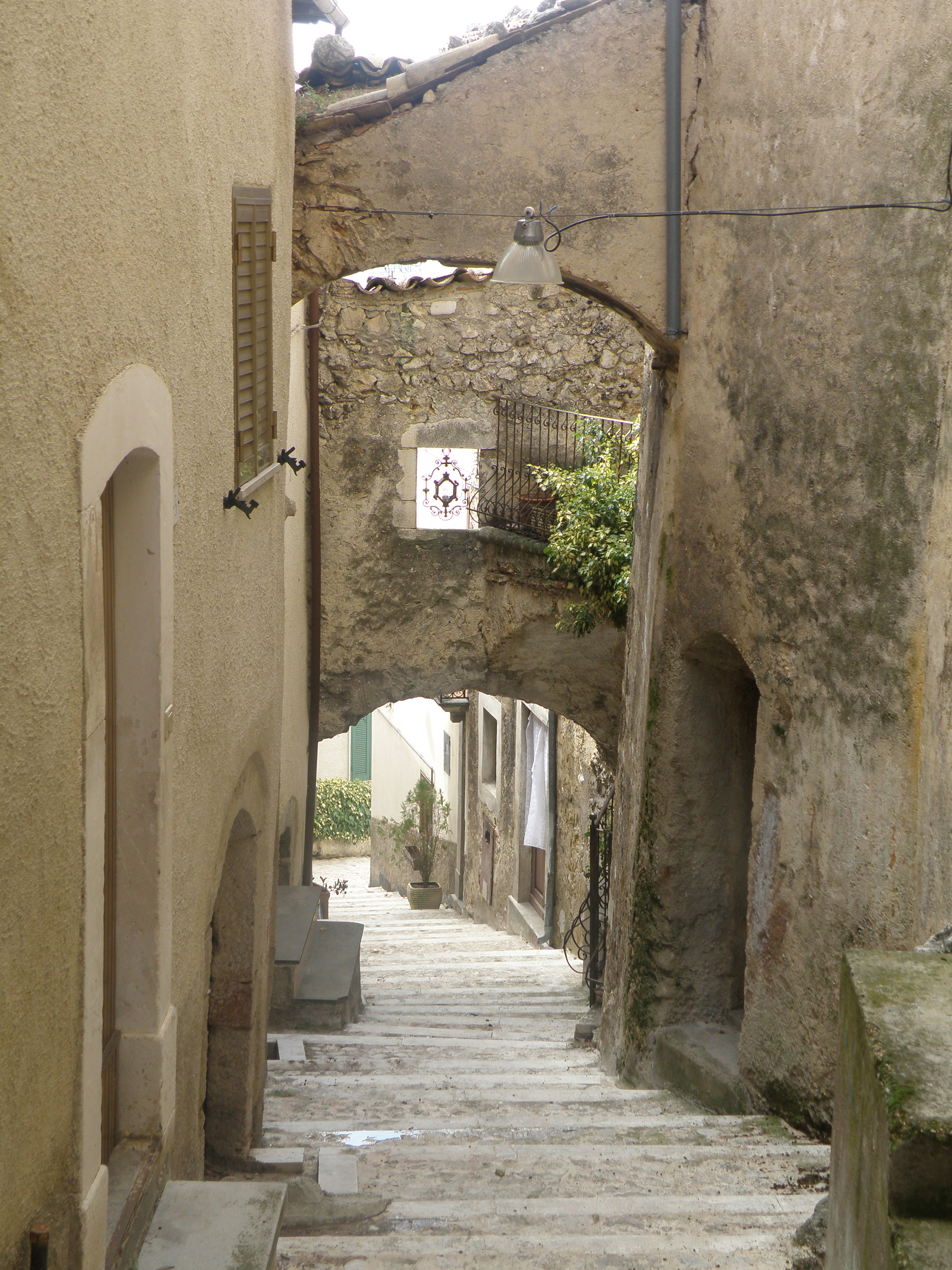 Ofena